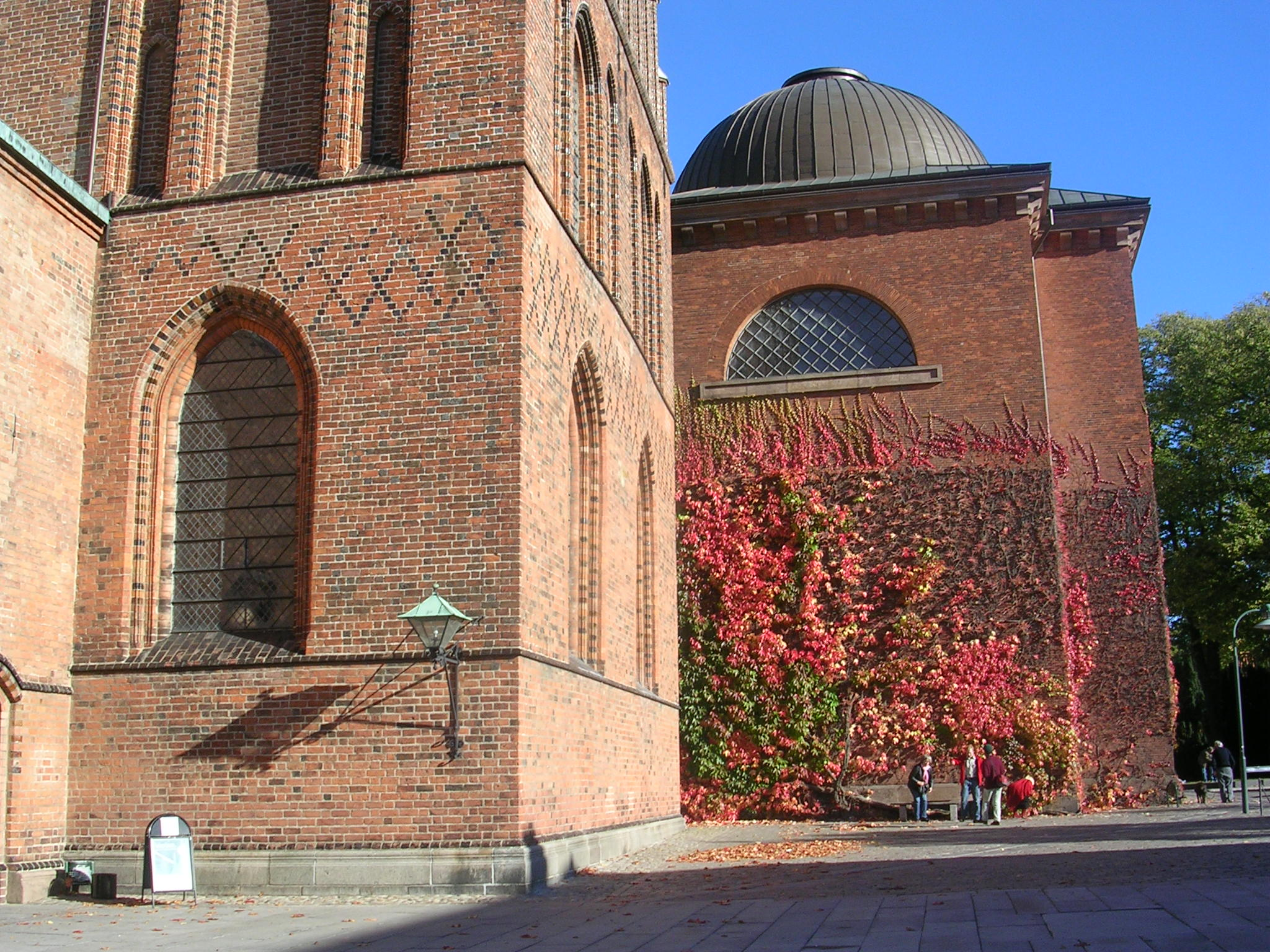 Roskilde domkirke Author: Väsk Date: 2005-10-16